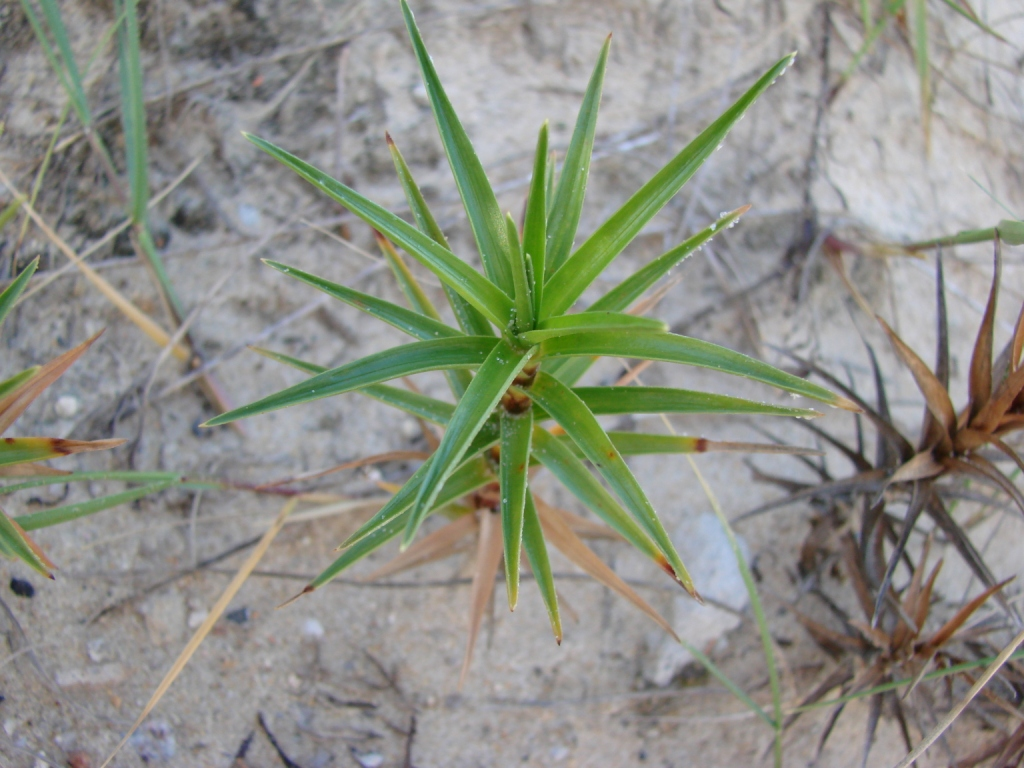 Remirea maritima CYPERACEAE Barra de Ibiraquera - Garopaba - SC - Brasil